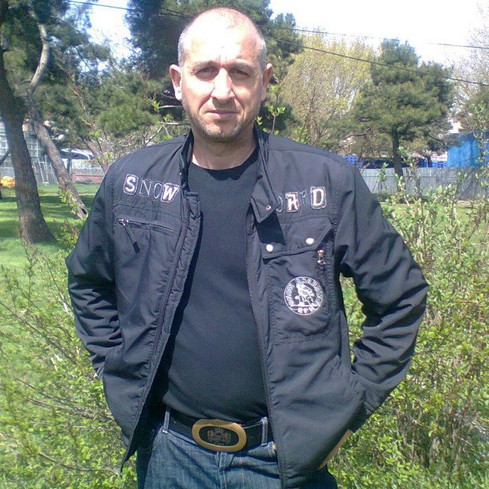 Şevket Candar, spielte von 1991 bis 1993 für Galatasaray Istanbul